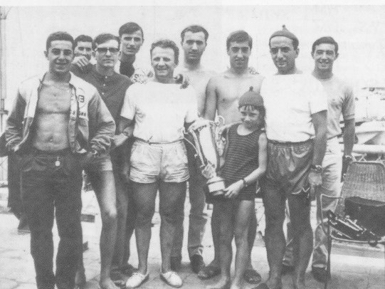 Presso il molo del porto di Rimini, organizzati da Franco Pavone, hanno luogo i primi campionati italiani di fondo di nuoto pinnato, nel 1964.